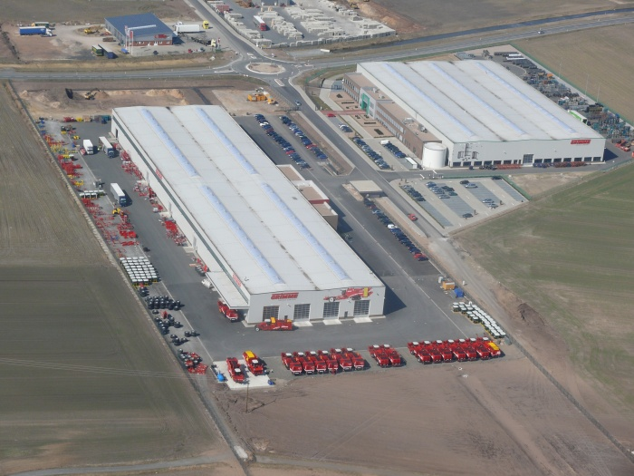 Standort der Grimme Landmaschinenfabrik im Niedersachsenpark, Rieste.